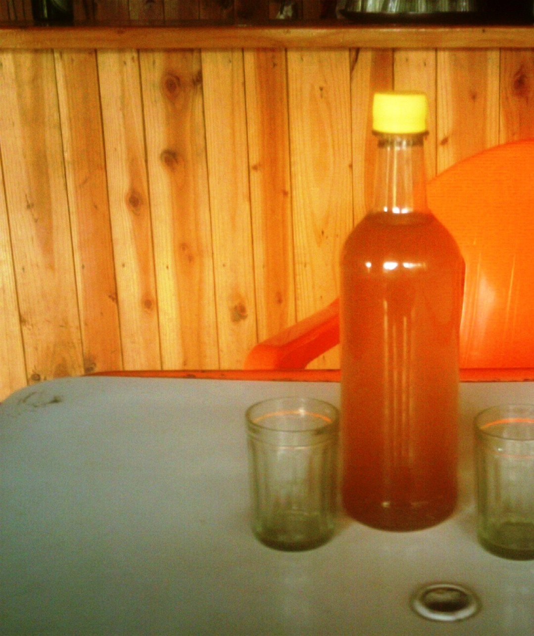 Chicha de manzana (sidra) fresca de Punucapa, Valdivia, Chile